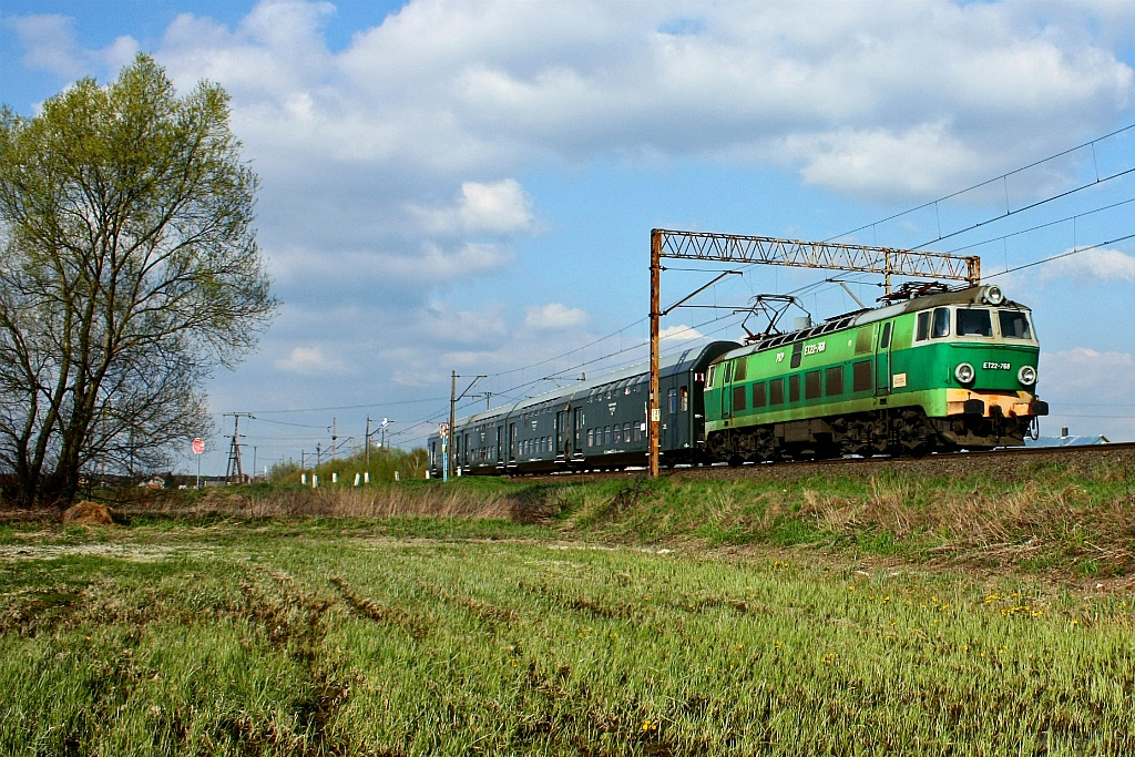 Czempiń - Iłowiec